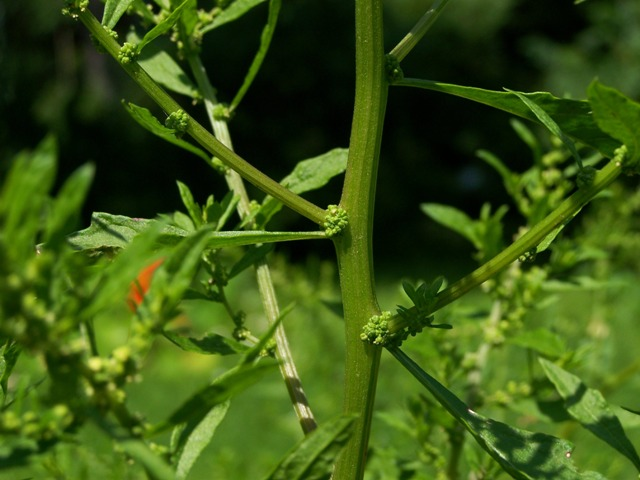 Dysphania ambrosioides (L.) Mosyakin & Clemants (Syn.: Chenopodium ambrosioides L.) Mexican Tea, Herba Sancti Mariæ Mexican Tea Jesuiten-Tee